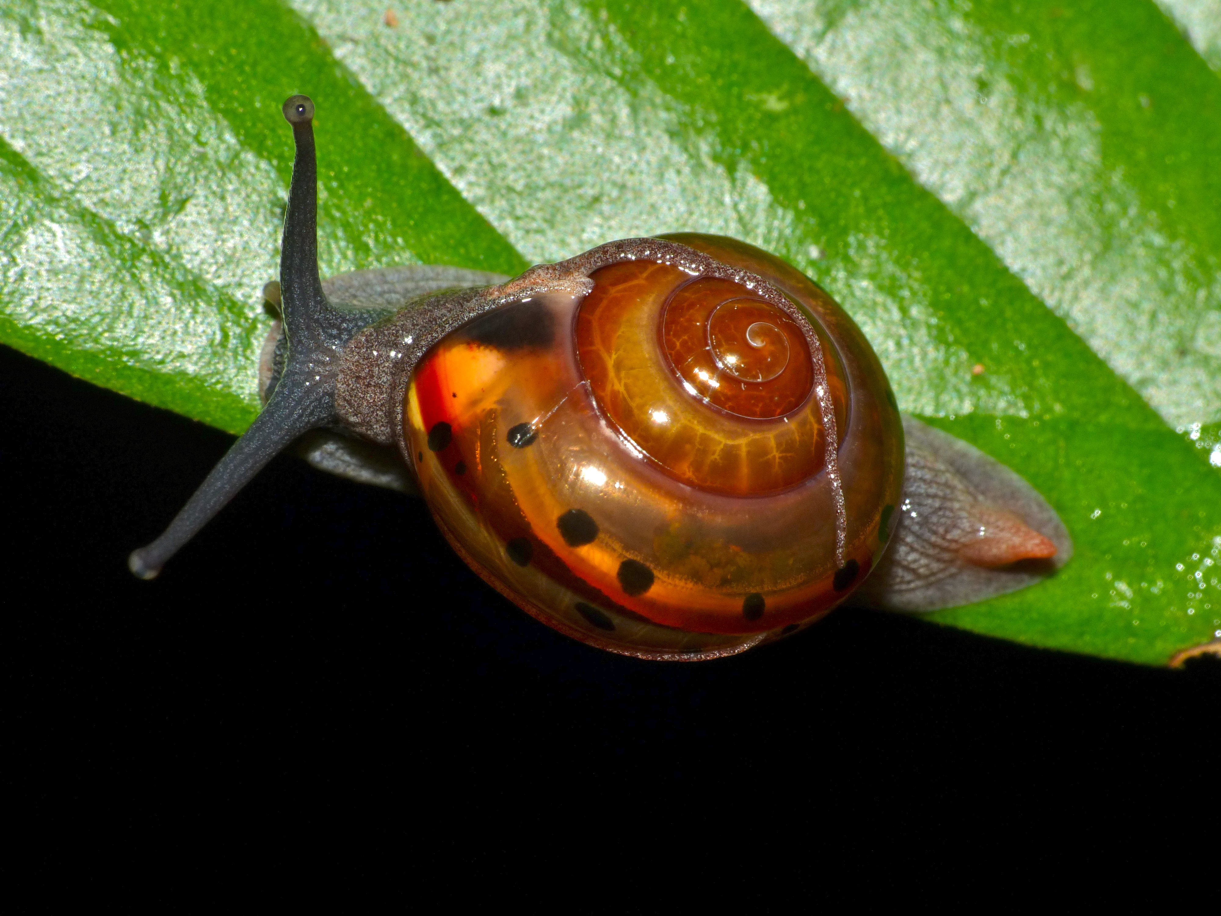 Night Walk Trail, Mulu NP, Sarawak, MALAYSIA